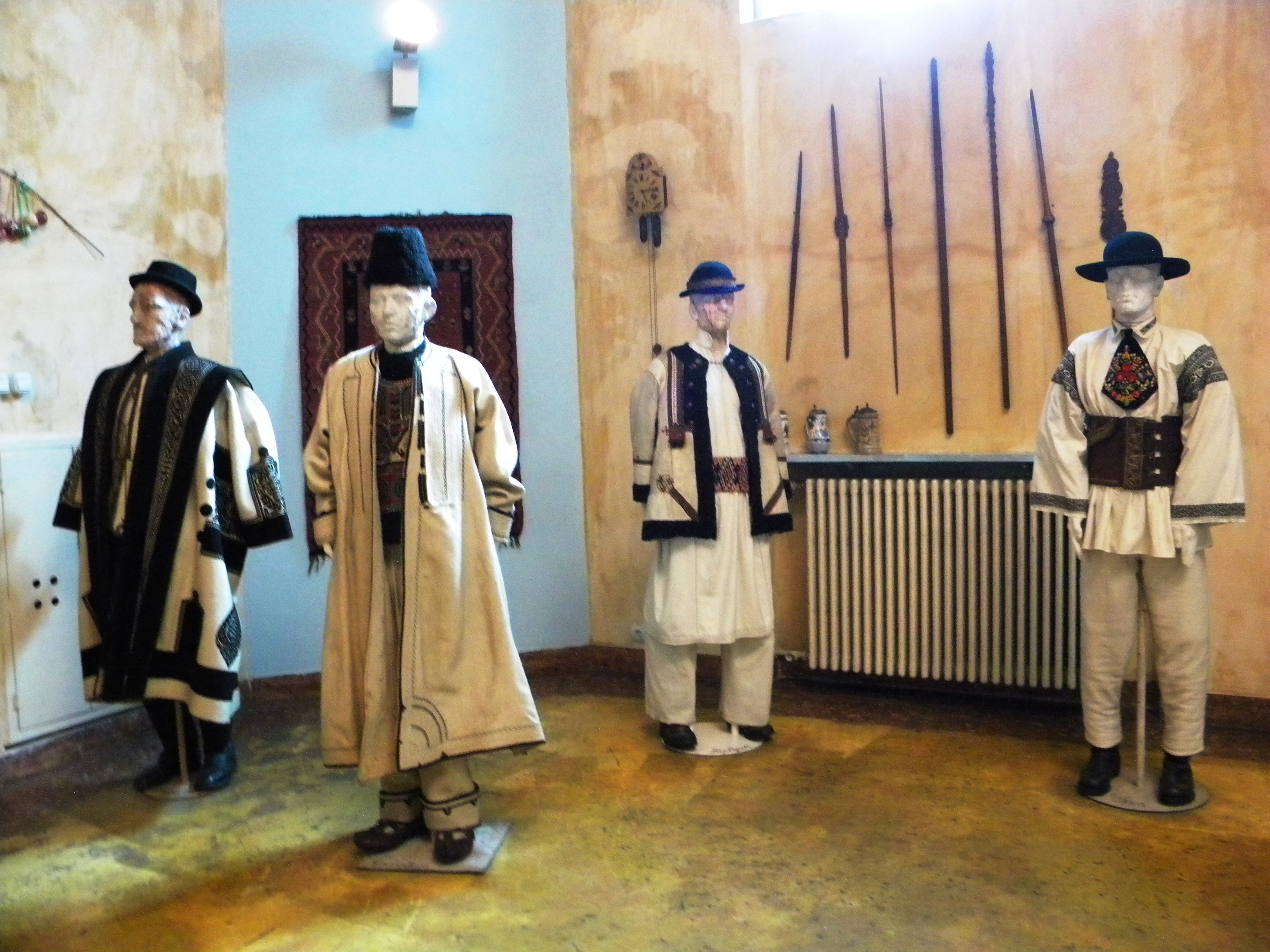 Bucuresti, Romania, Muzeul Taranului Roman (interior 38)(costume populare barbatesti); B-II-m-A-18985